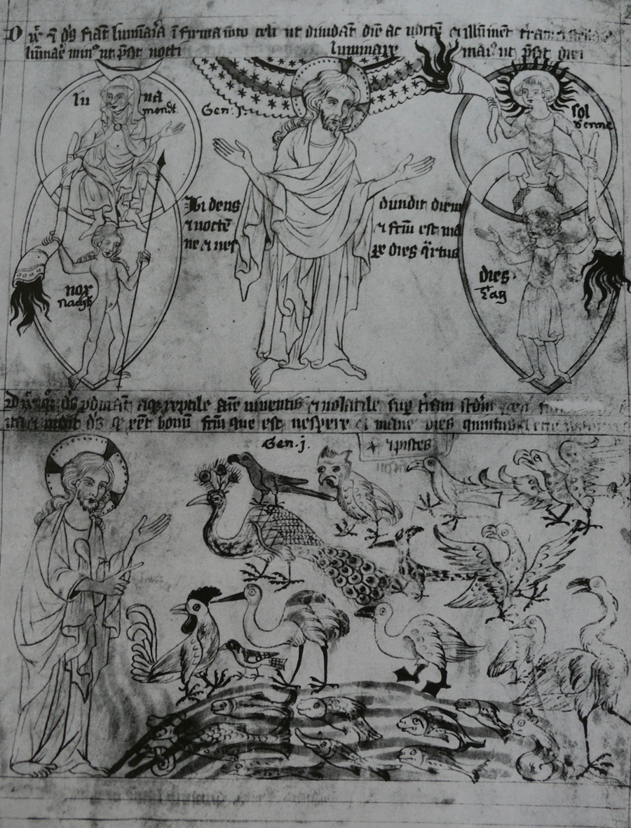 Stvoření světa - Velislavova bible